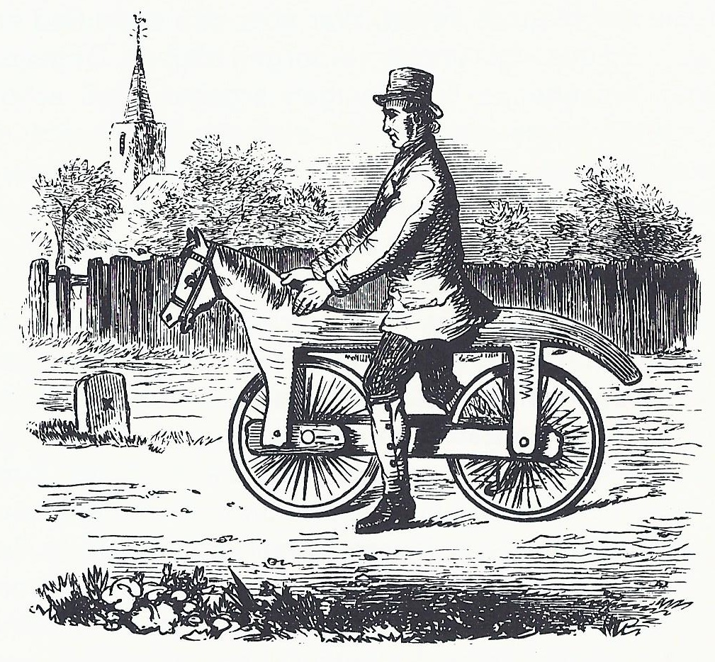 Zeichnung der Célérifère (Laufmaschine des Grafen de Sivrac)